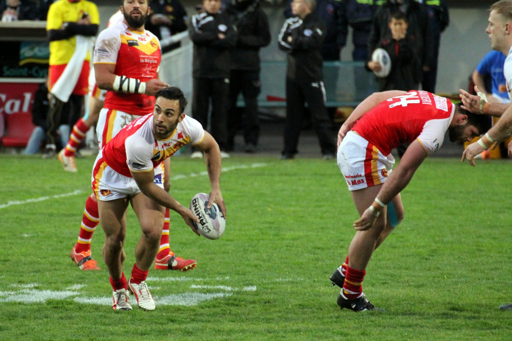 Eloi Pelissier , joueur de rugby à XIII français, en 2014 avec les Dragons Catalans contre les Giants d'Huddersfield